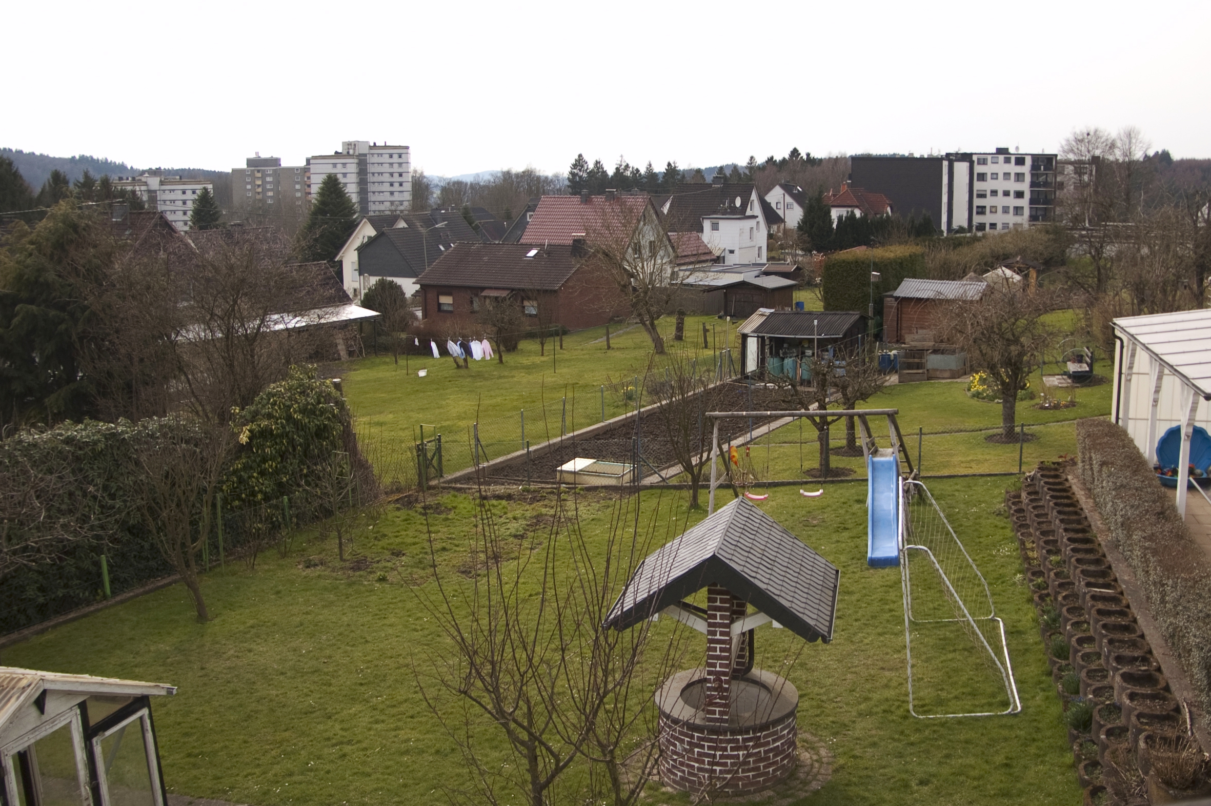 Blick aus der Königsberger Straße über den Westen von Hackenberg